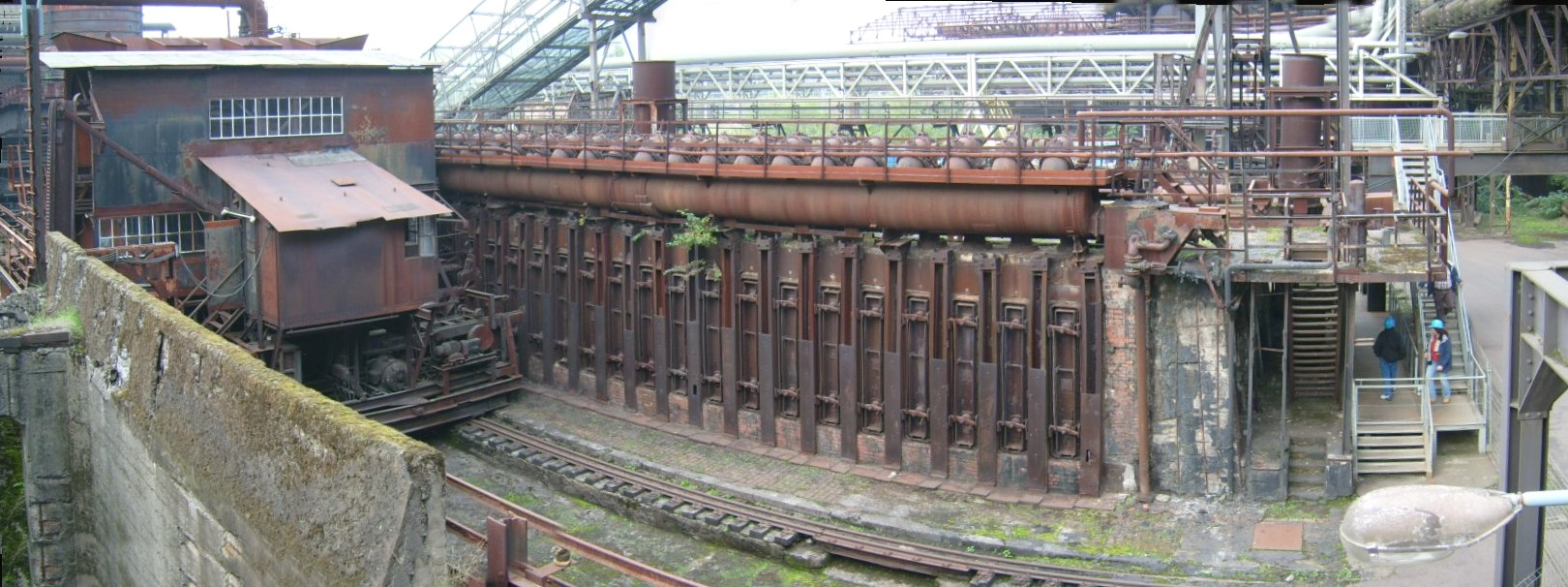 Kokerei der Völklinger Hütte